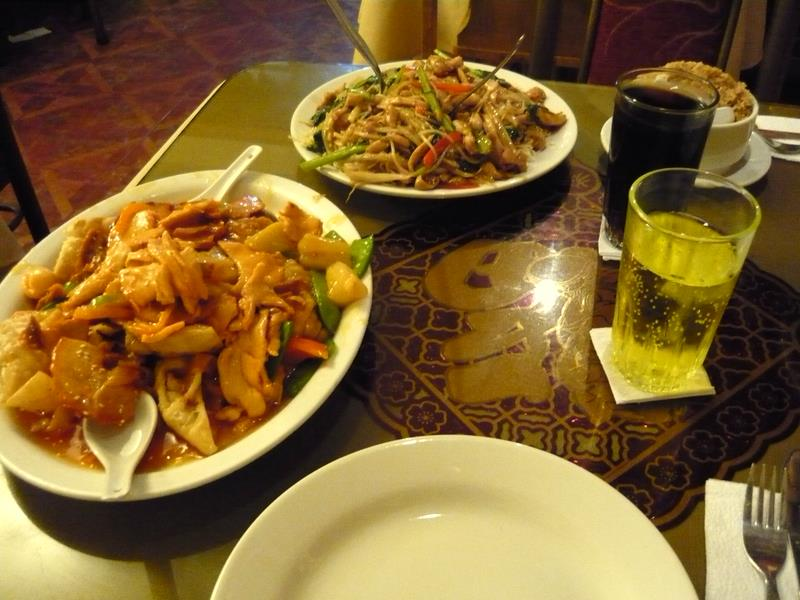 Kamlu Wantán y Tallarines saltados con pollo, en el San Joy Lao de Capón